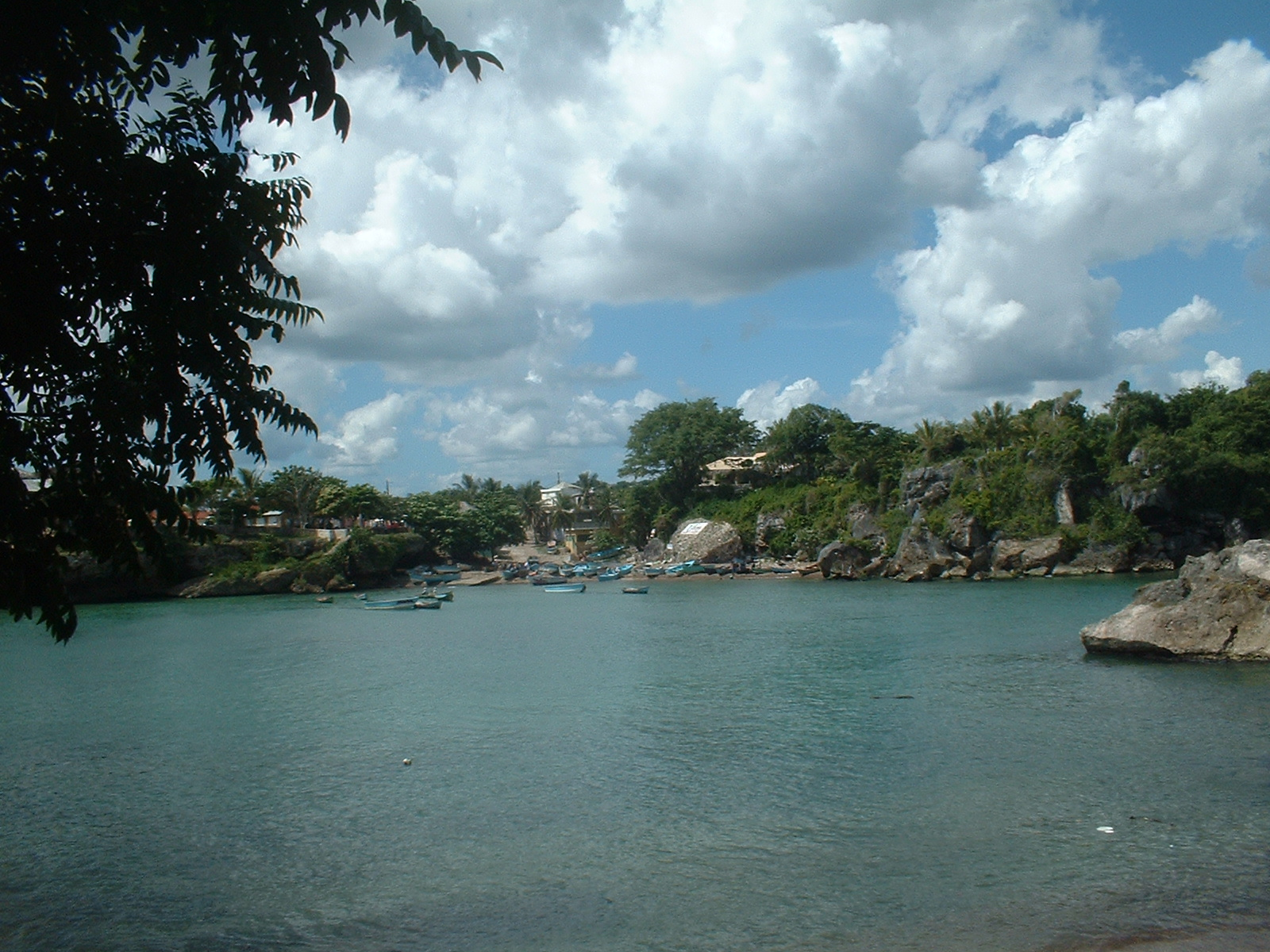 Port de Boca de Yuma